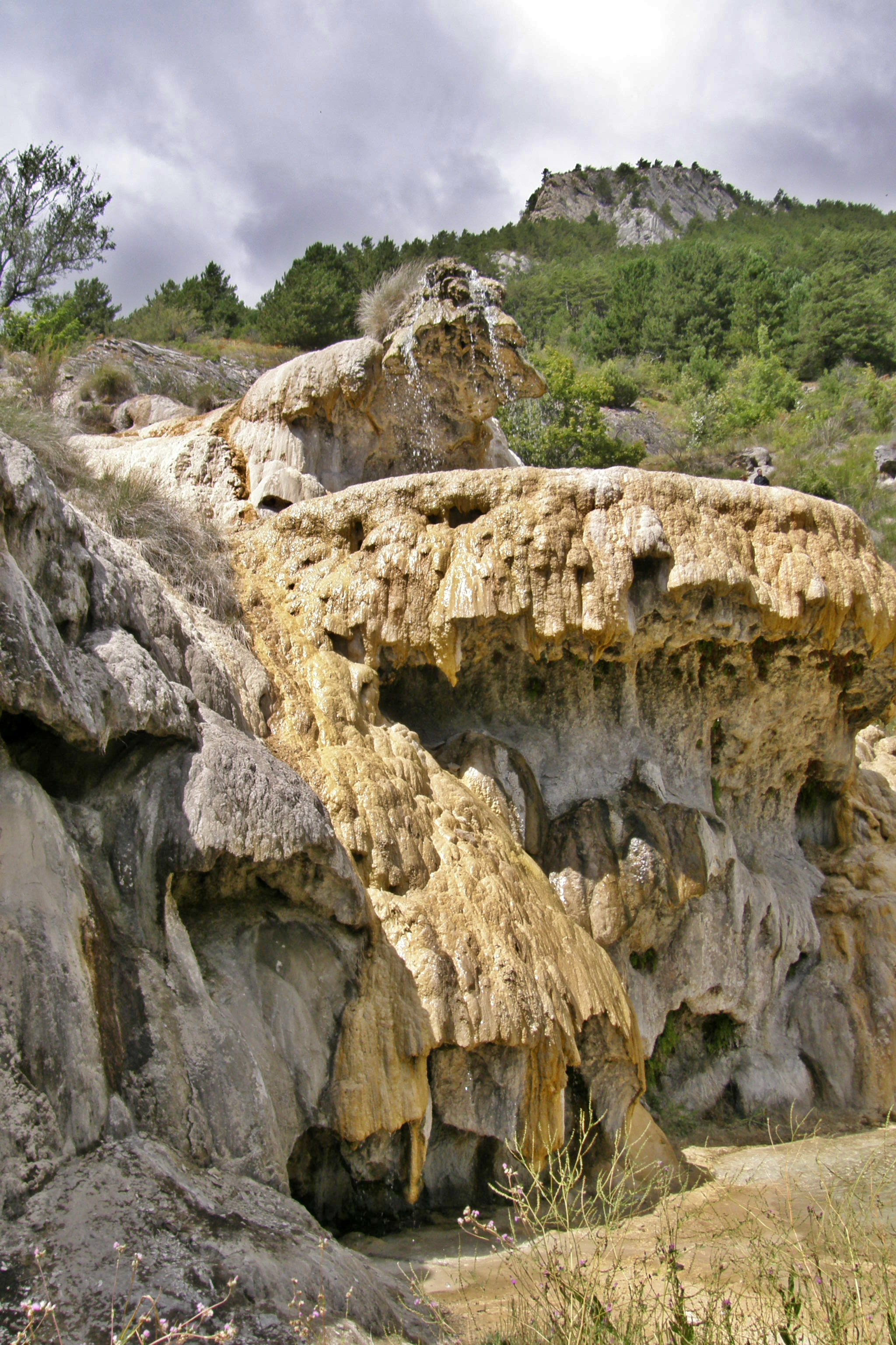 Fontaine pétrifiante de Réotier alimentée par les eaux de la Salce, département des Hautes-Ales, France